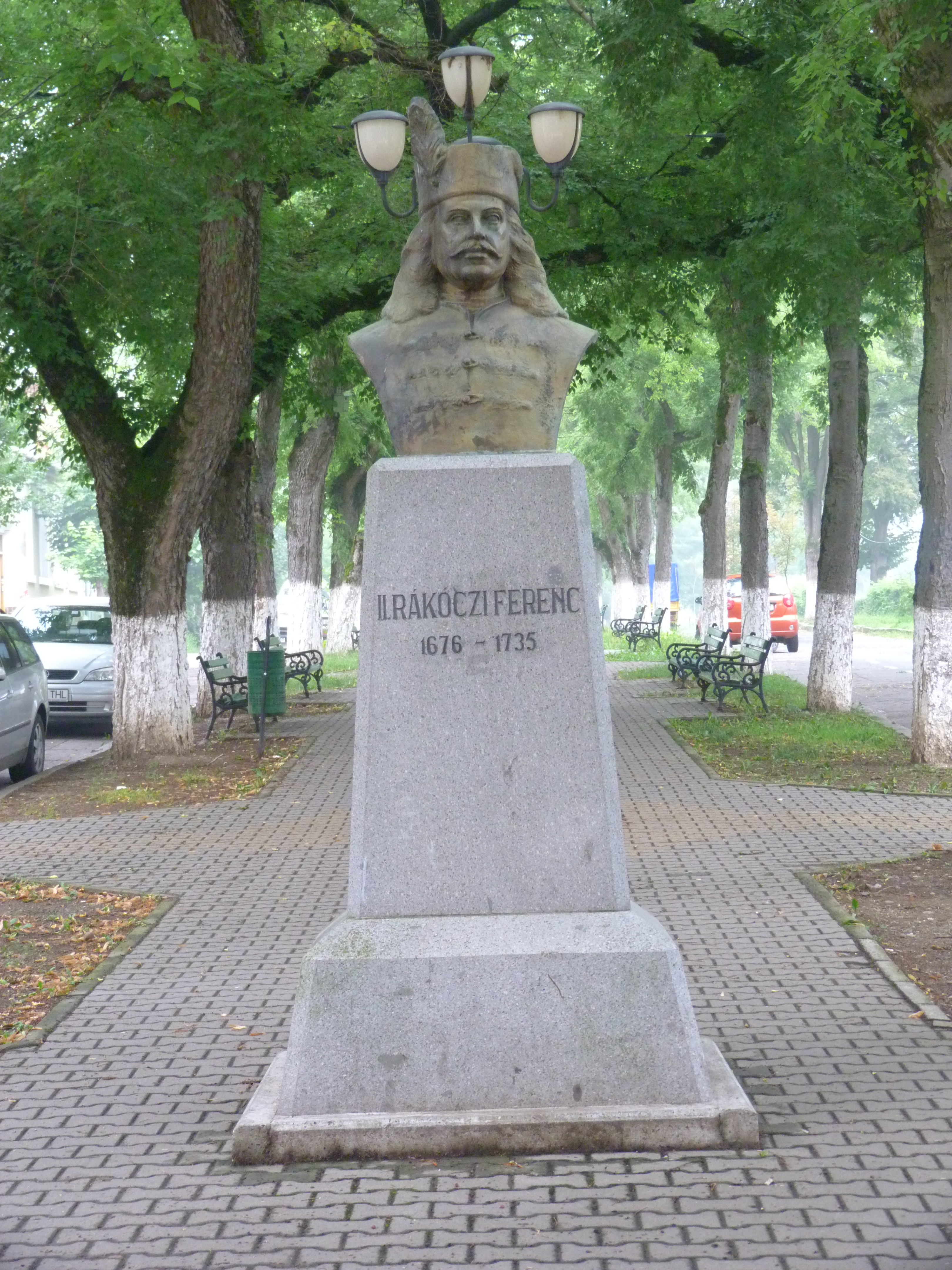 A felvétel 2013. július 12 -én pénteken készült Marosvásárhelyen. ©© Published under Creative Commons in the Metapolisz DVD line. All of the photos and vids in the Metapolisz DVD line are under Creative Commons and can be used even for commercial – for profit – purposes. Recommended Citation Derzsi Elekes Andor: Metapolisz DVD line